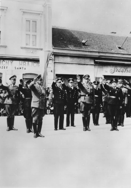 Ministerialrat Dr. Hans Globke 1941 in Bratislava. Vorn links: Reichsinnenminister Dr. Frick, vorn rechts: Staatssekretär Dr. Stuckart, zwischen beiden dahinter Dr. H.Globke.